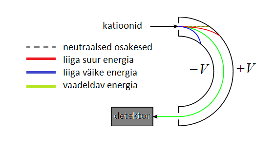 osakesed energiate järgi